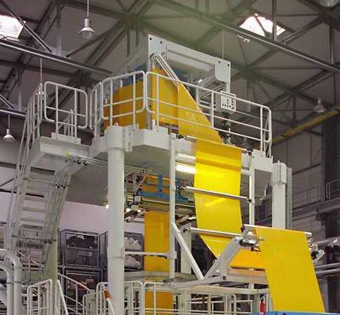 Wendestangensystem einer Blasfolienanlage